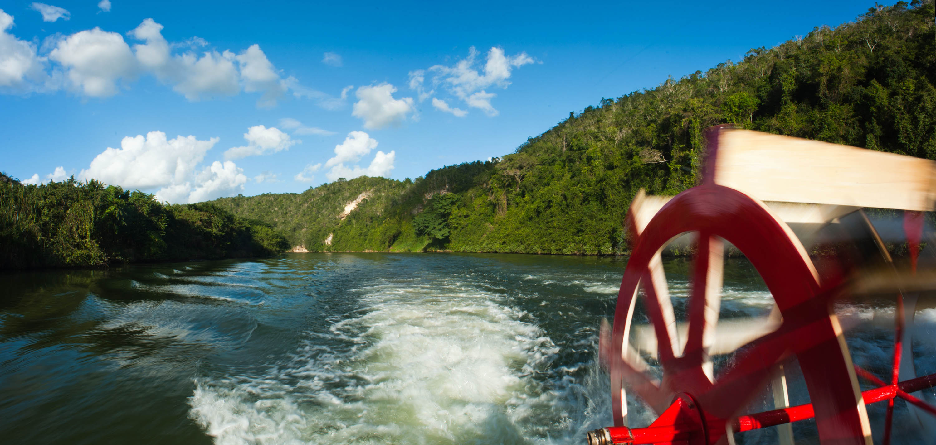 Keywords: Altos de Chavón; Caribbean; Casa Del Campo; Dominican Republic; La Romana Chav√≥n River. Casa de Campo (historical village), La Romana, Dominican Republic.